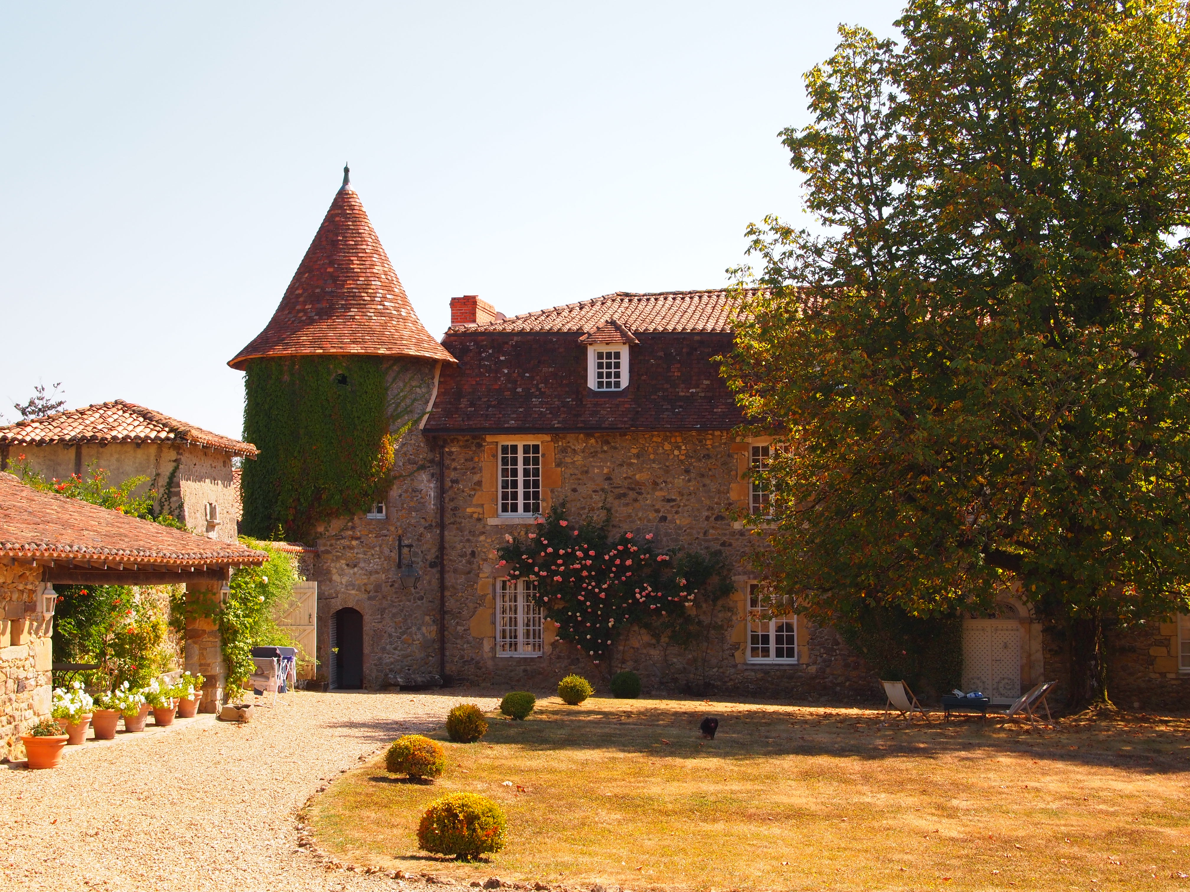 Château de Praisnaud, à Ambernac en Charente (inscrit, 2004)